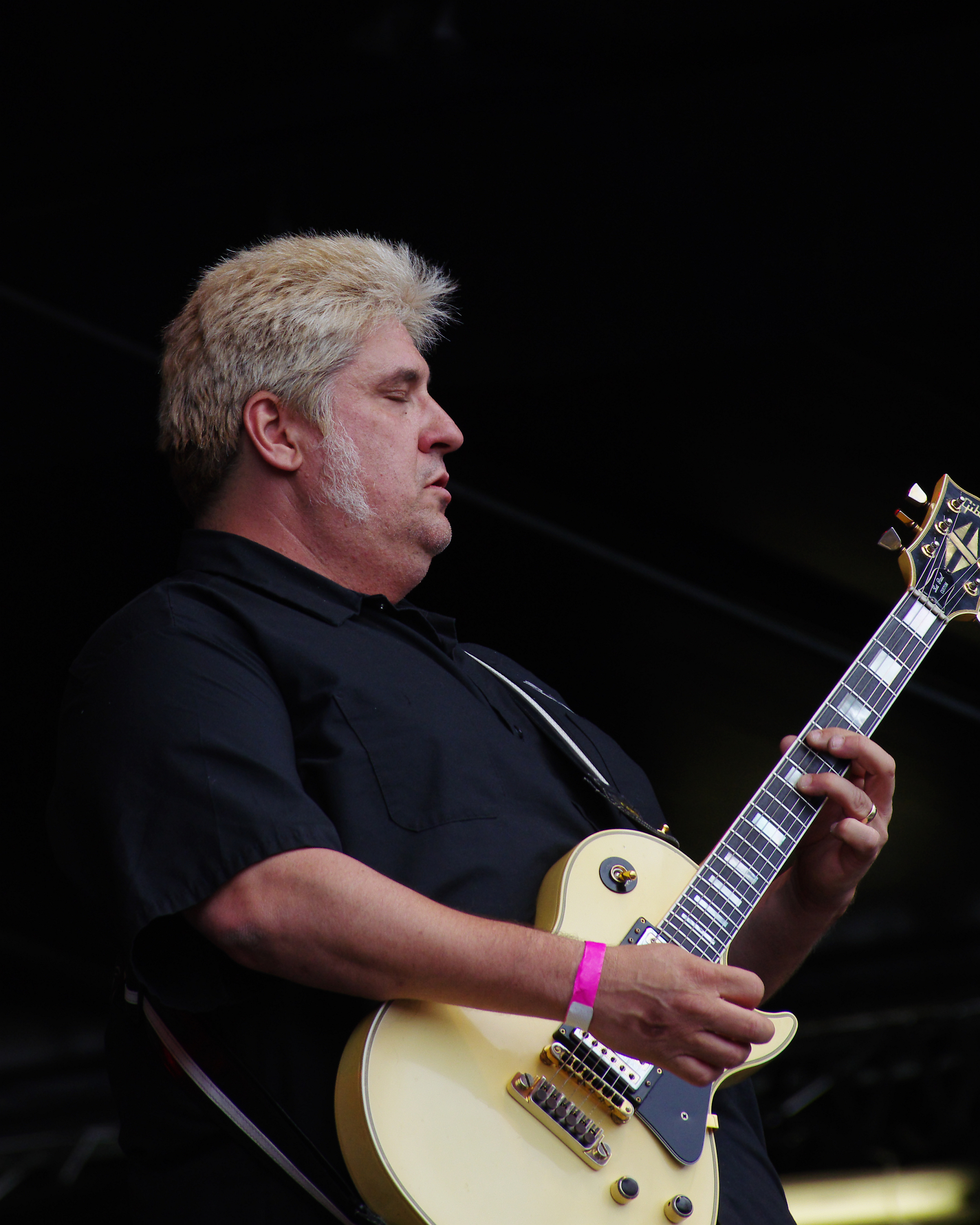 The Generators, Punkrockband aus Los Angeles, Auftritt beim Ruhrpott Rodeo 2013 in Hünxe. Mike Snow (Gitarre)